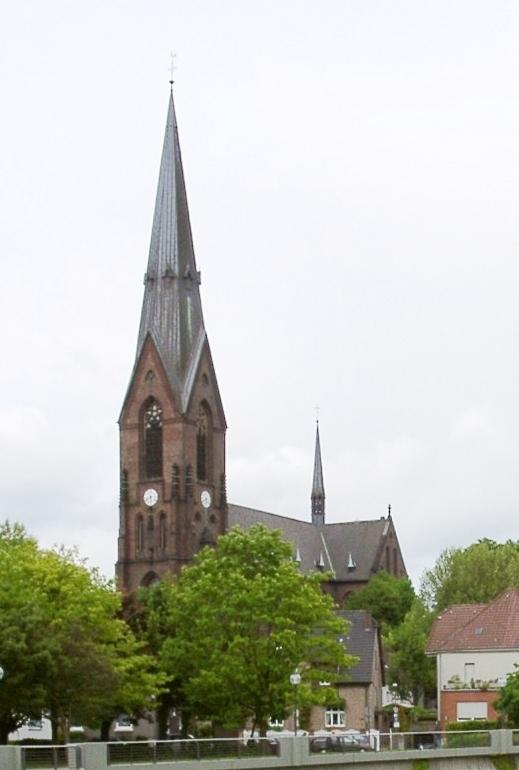 Lünen, Nordrhein-Westfalen, St. Marien-Kirche am Lippe-Ufer